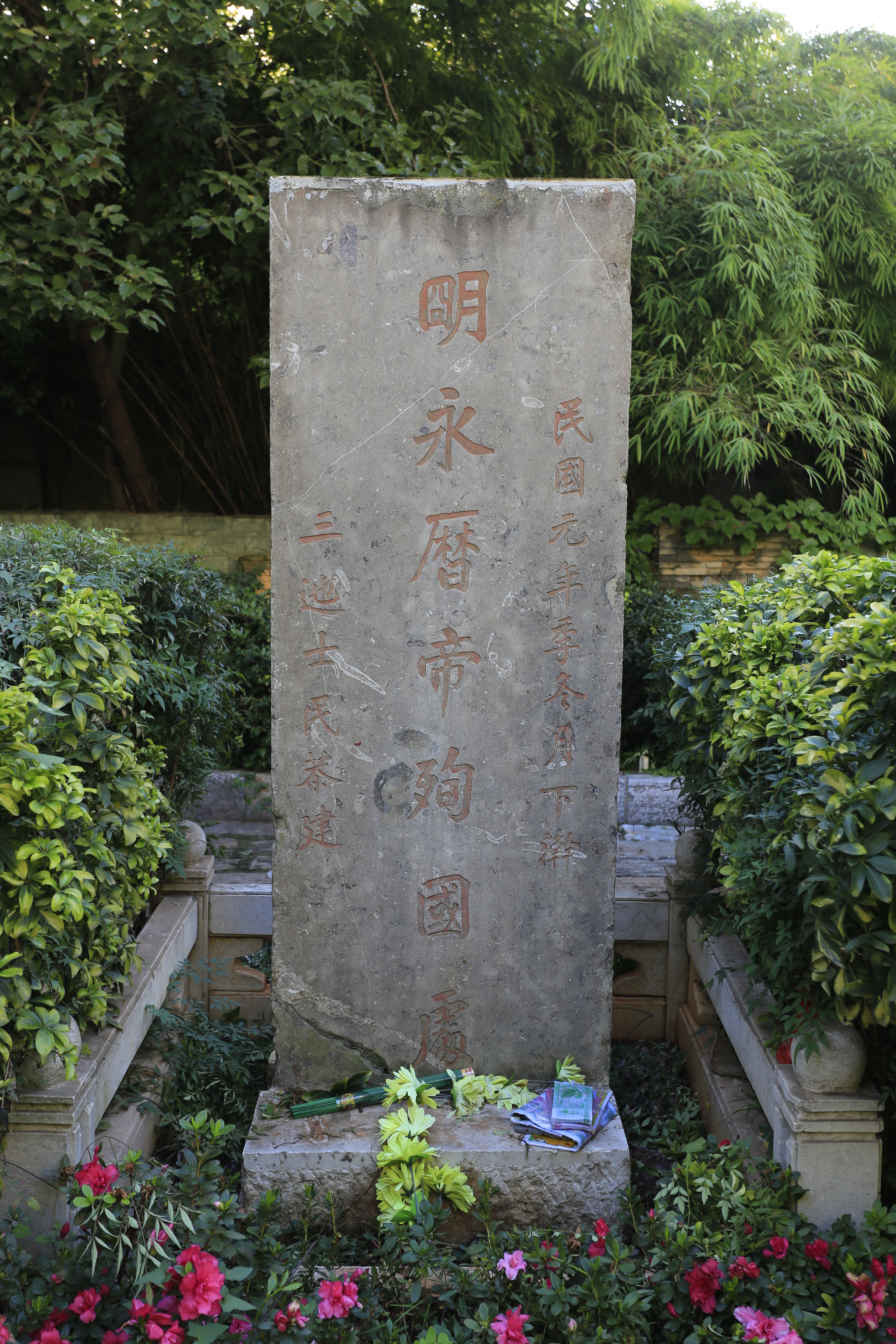 明永历帝殉国处碑